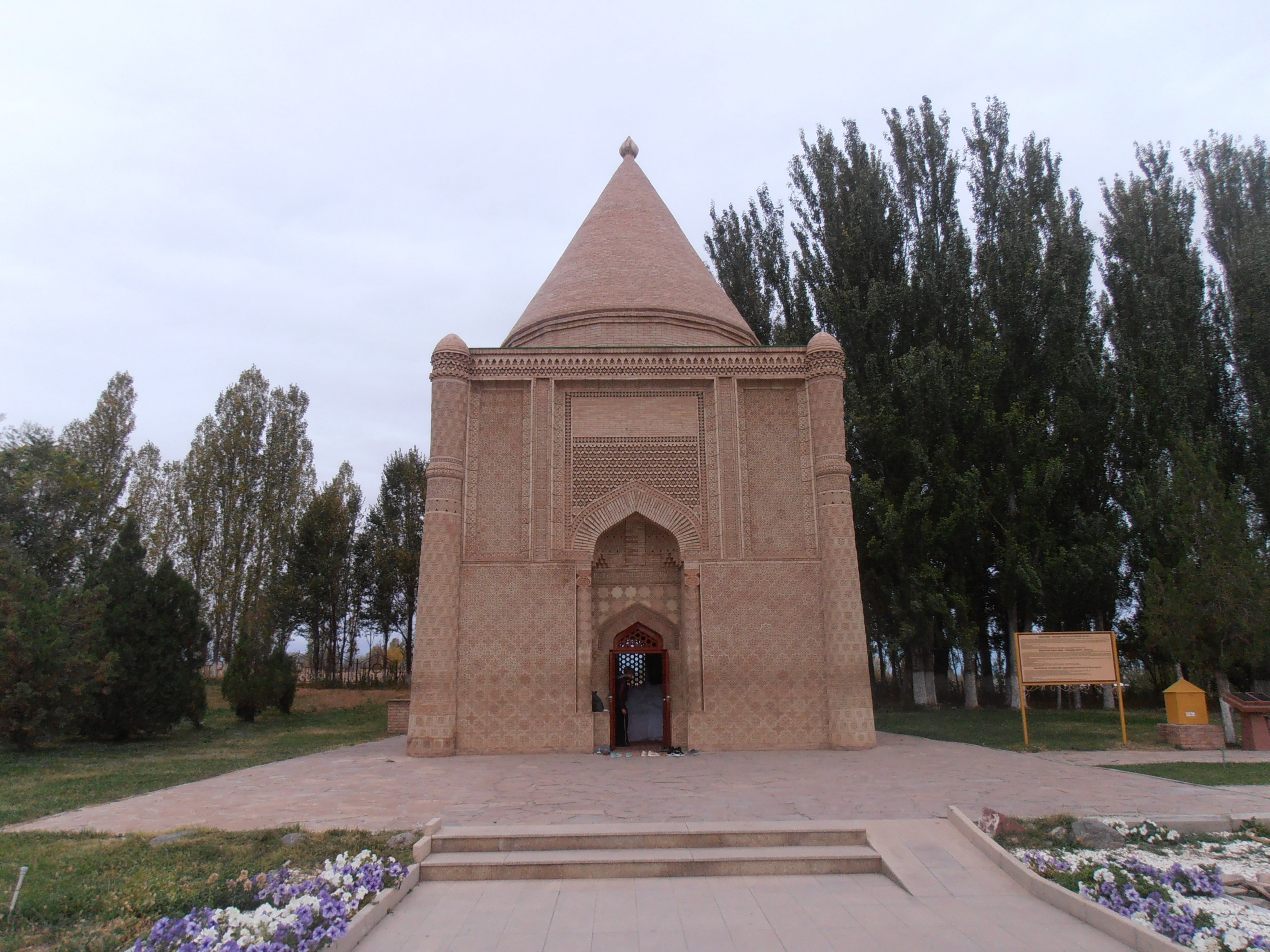 Лицевая сторона мавзолея Айши-Биби.